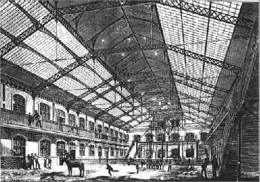 Gravure de 1875 du hall de l'École Monge, devenu en 1895 lycée carnot, Paris. Construit par Gustave Eiffel.